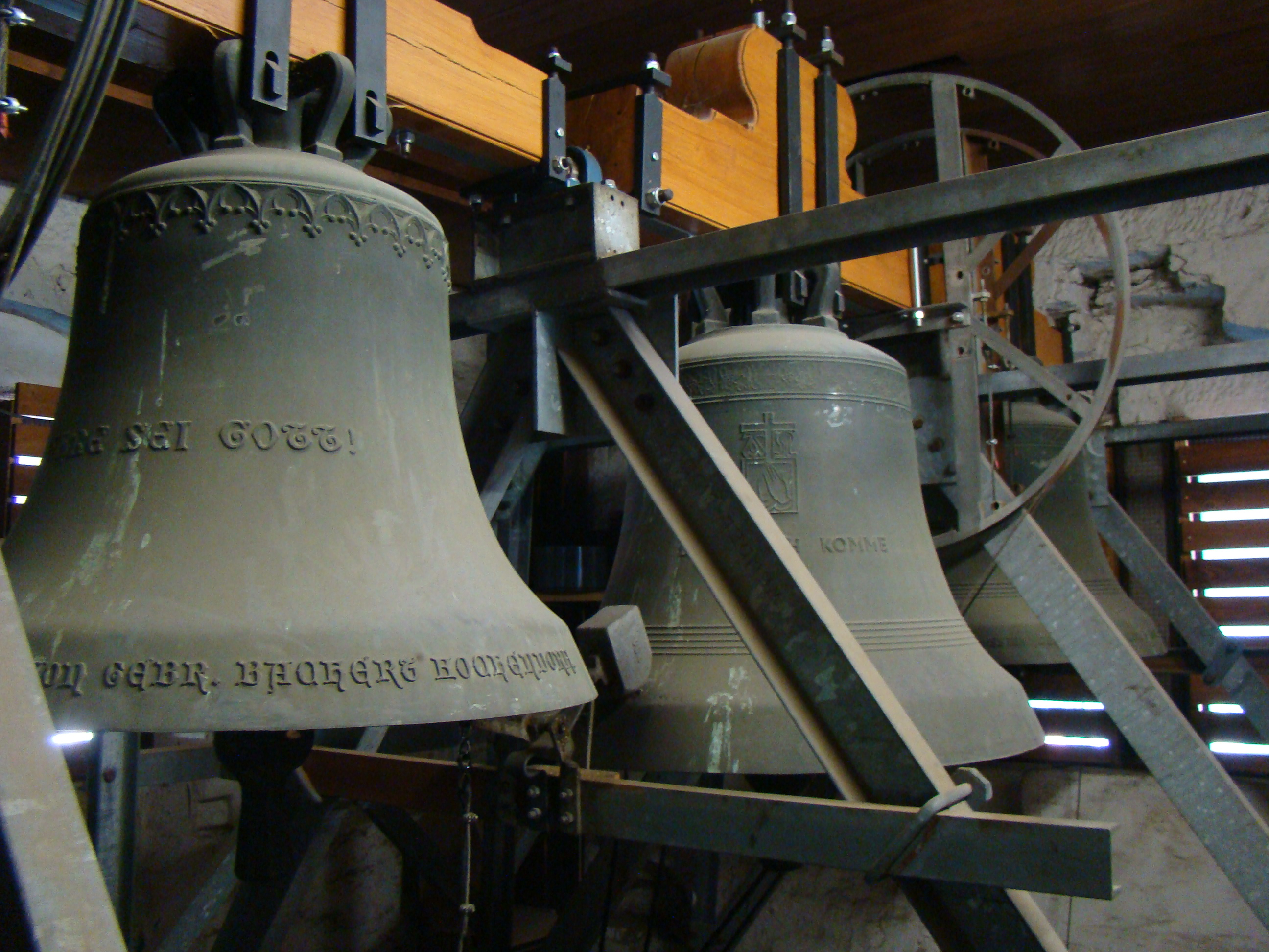 Albanskirche in Heilbronn-Frankenbach: Glockenstuhl. Tag des offenen Denkmals 2012.